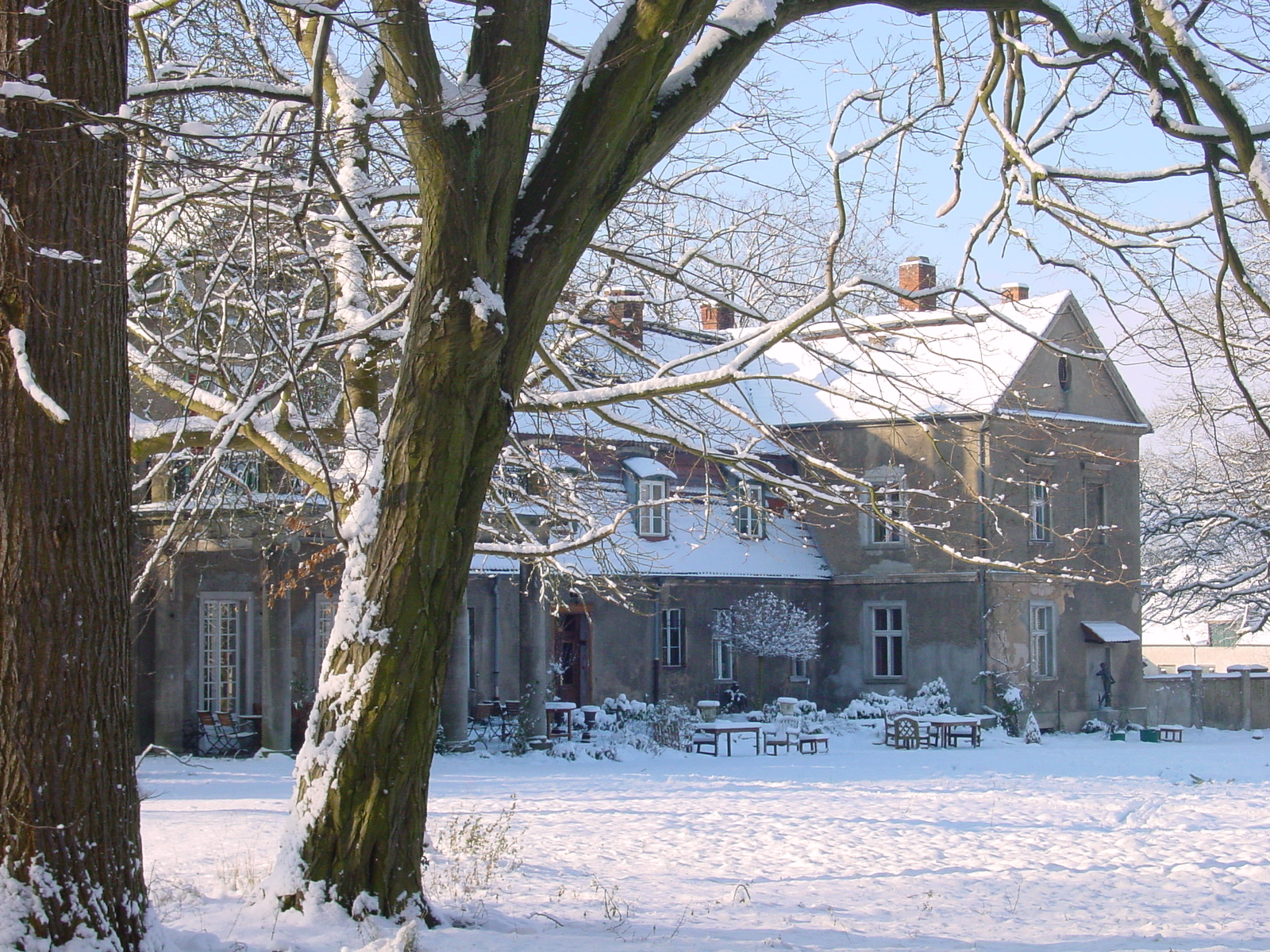 Das Bild zeigt das Rittergut Hirschfelde von der Parkseite im Winter.